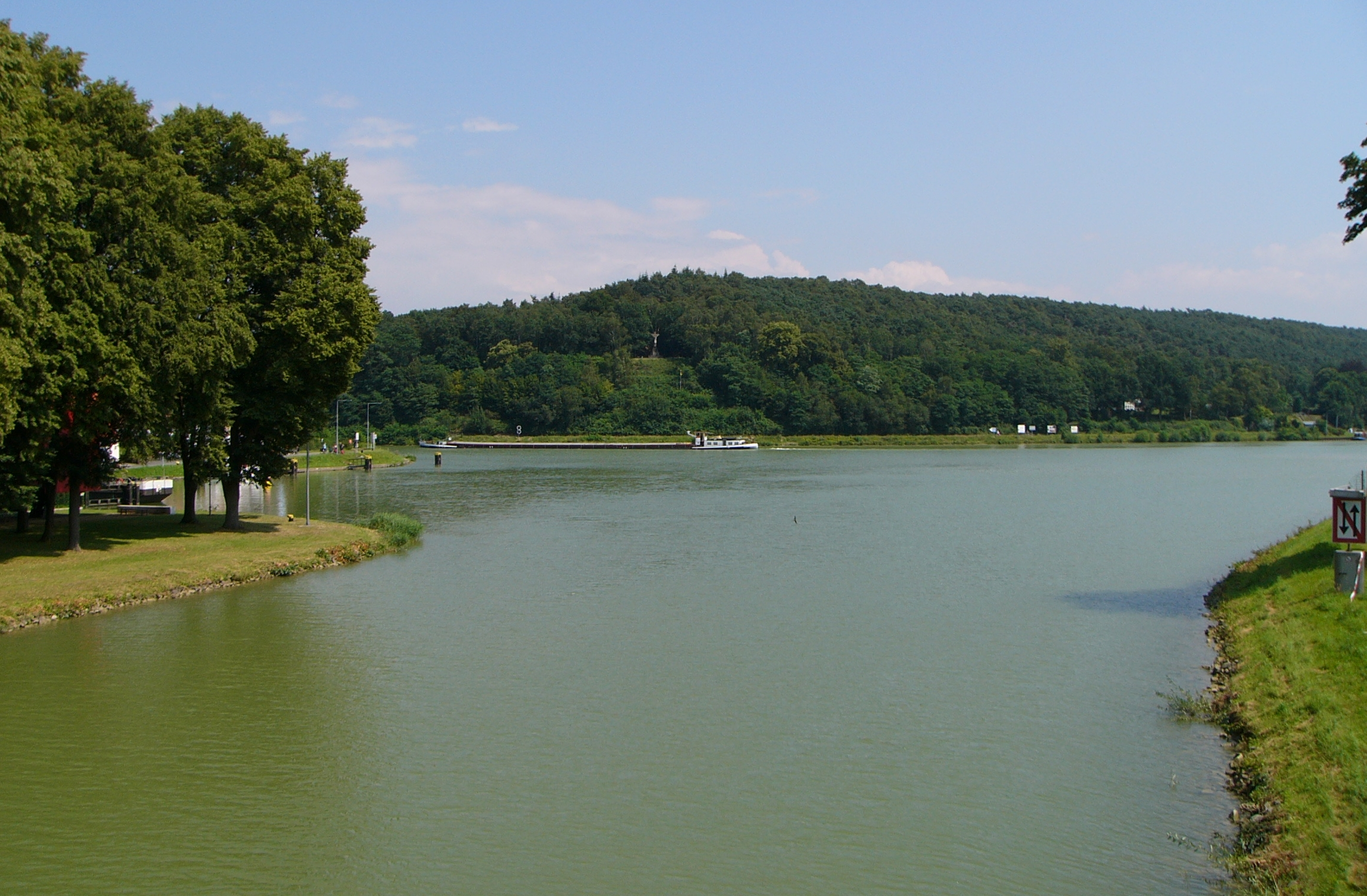 Abzweig des MLK vom DEK am Nassen Dreieck, im Vordergrund nach rechts verlaufend der DEK, das Binnenschiff fährt aus Richtung Münster kommend in den Mittellandkanal ein.